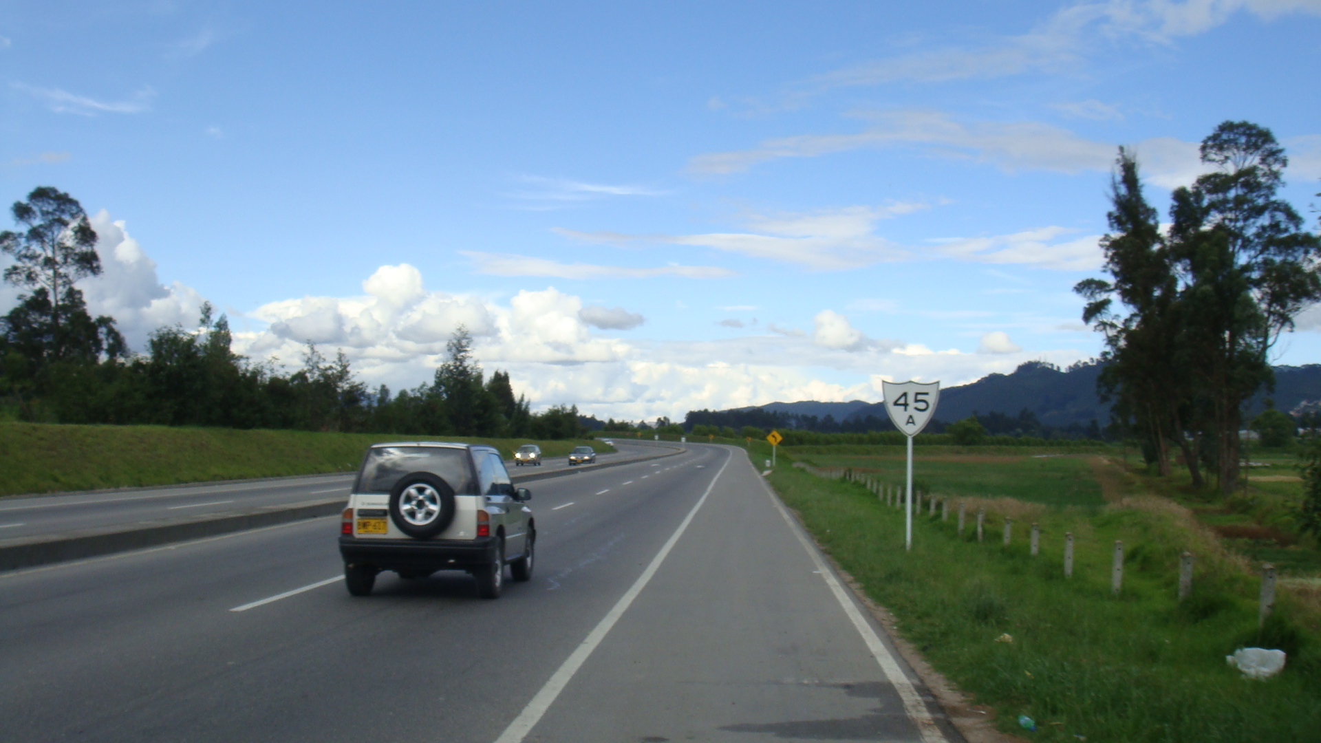 Ruta Nacional 45A de Colombia en el tramo de Cajicá a Zipaquirá.